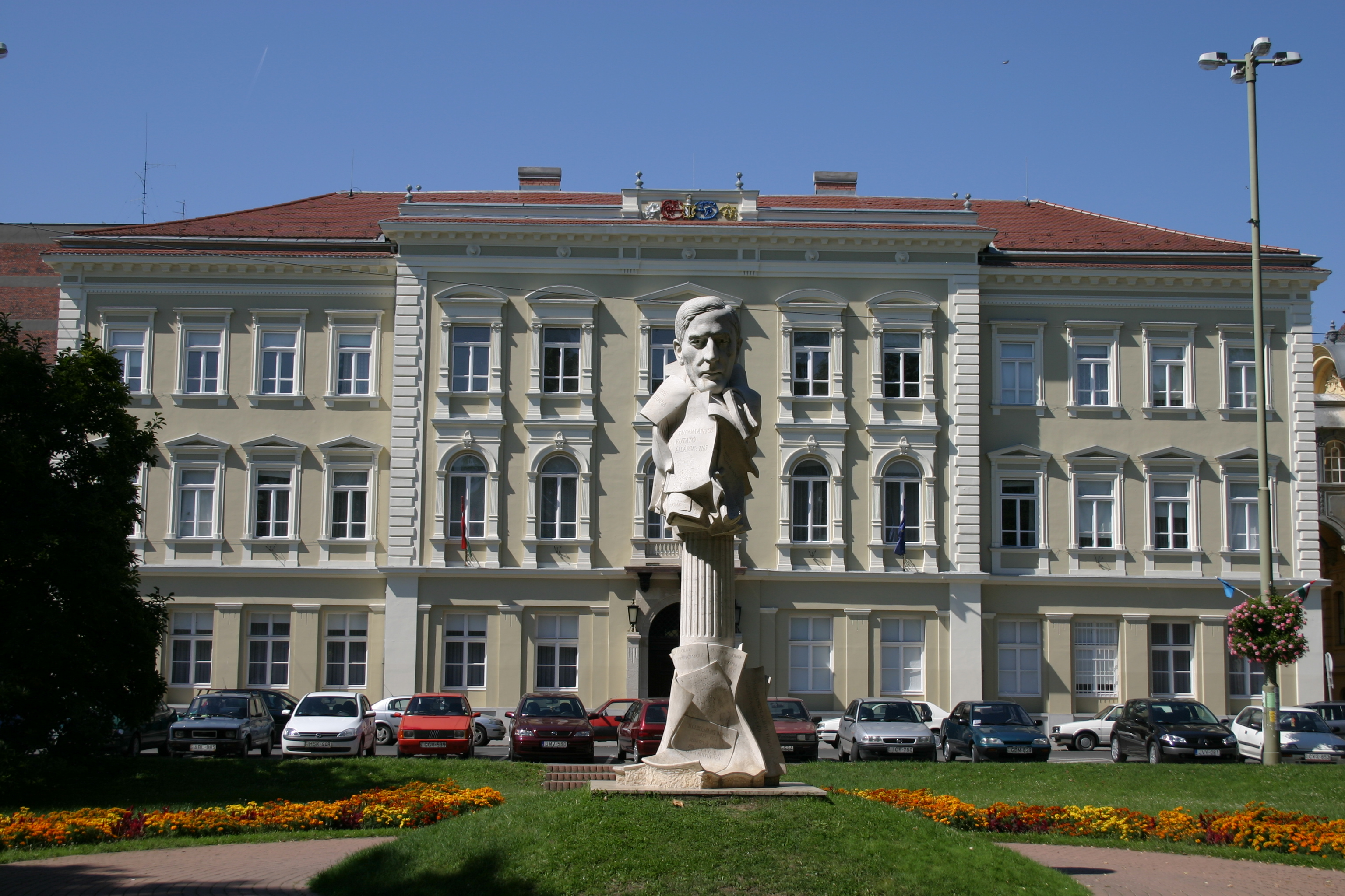 Klebelsberg Kunó szobra a szegedi Széchenyi téren (Melocco Miklós alkotása, 2000)